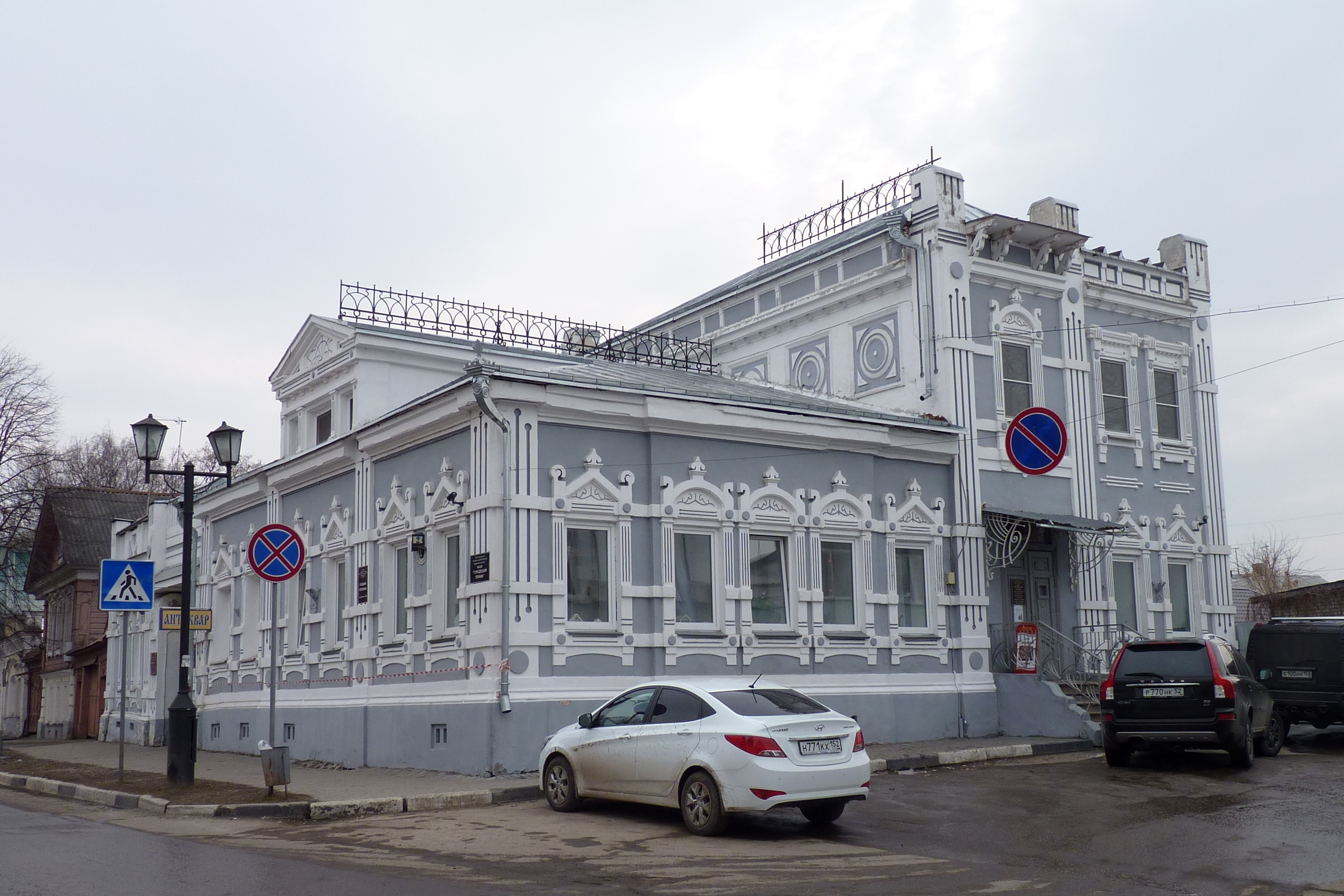 Усадьба Петелина (Потелина), 1906 г.